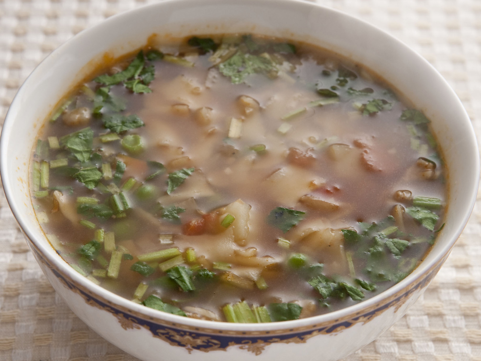 スイカシ。シルクロード・タリム（東京）調理。